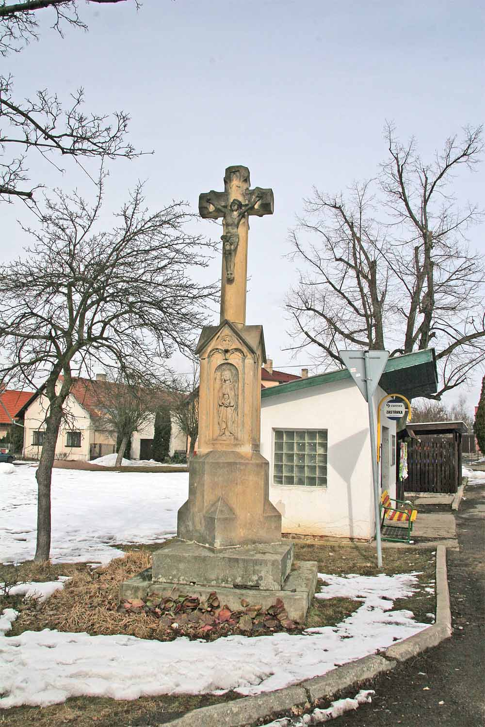 Vysoké Chvojno - kříž na návsi